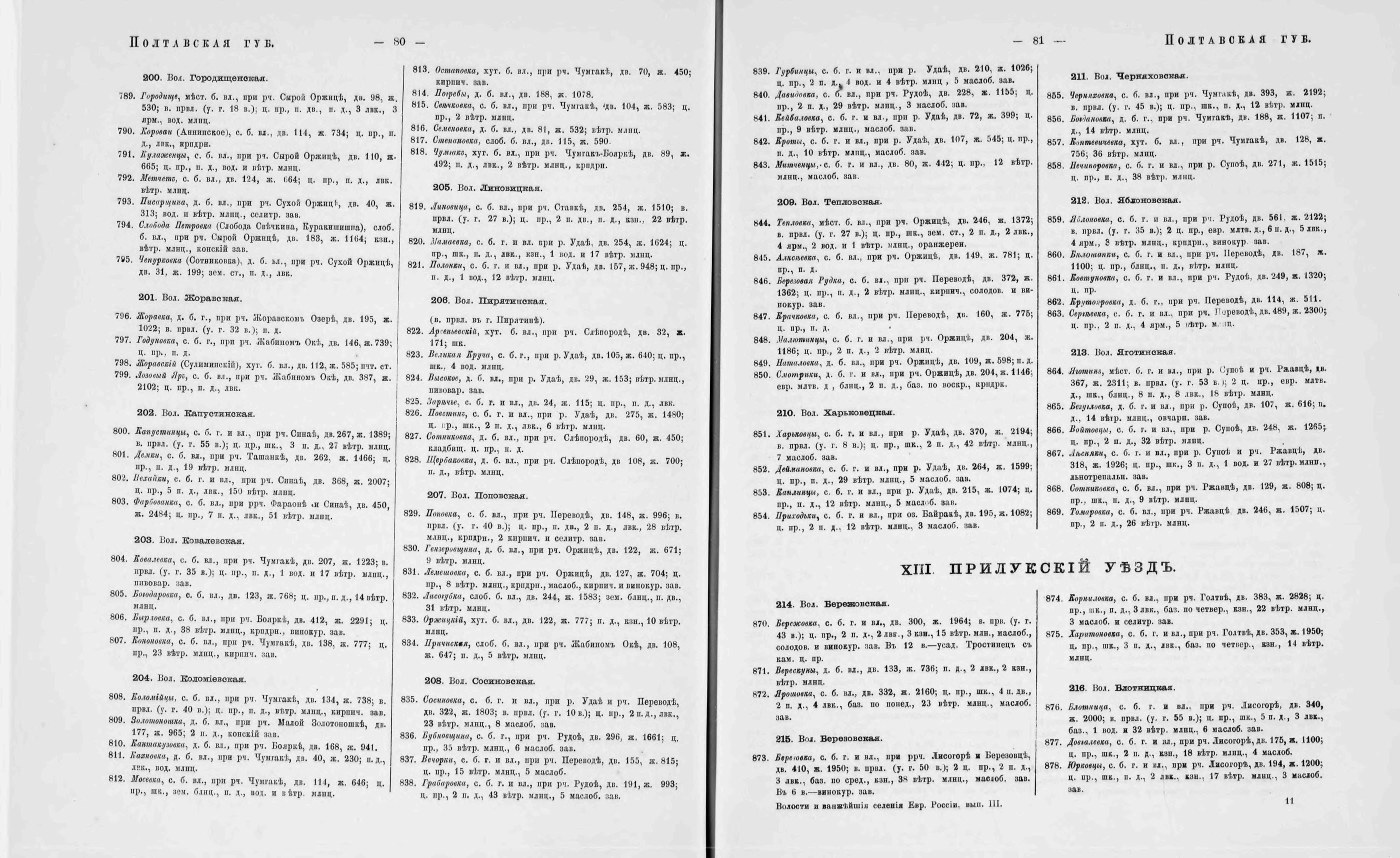 Волости и важнѣйшія селенія Европейской Россіи. По данным обслѣдованія, произведеннаго статистическими учрежденіями Министерства Внутренних Дѣл, по порученію Статистическаго Совѣта. Изданіе Центральнаго Статистическаго Комитета. Выпускъ III. Губерніи Малороссійскія и Юго-Западныя. СанктПетербургъ. 1885.